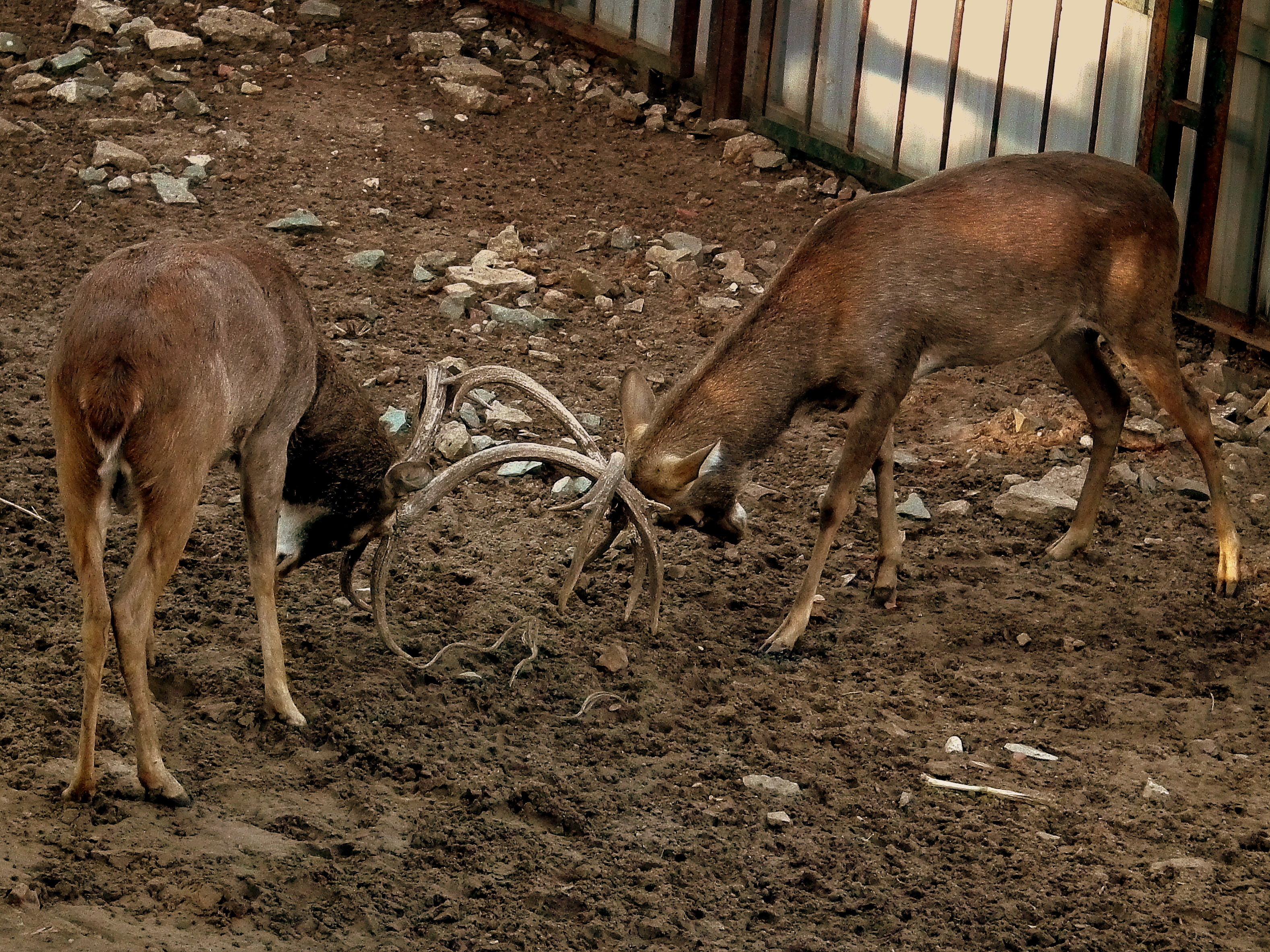 SAIGON ZOO SAIGON/HO CHI MINH VIETNAM JAN 2012